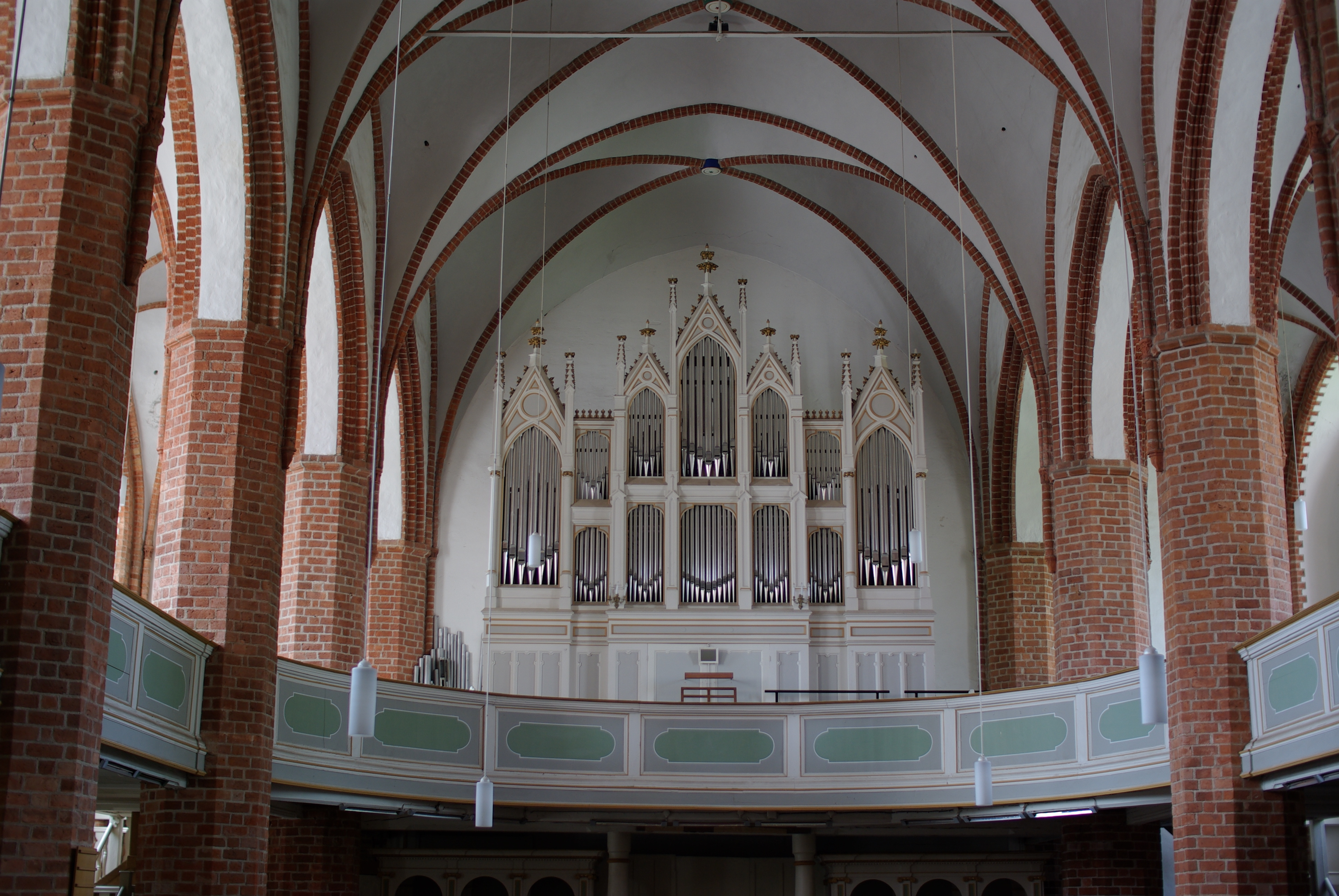 Kyritz in Brandenburg. Die Kirche entstand wahrscheinlich schon Ende des 13. Jh.s und wurde im 15. Jh. erweitert. Nach dem Stadtbrand wurde sie in den Jahren 1709–1712 wieder aufgebaut. Die Kirche ist denkmalgeschützt.